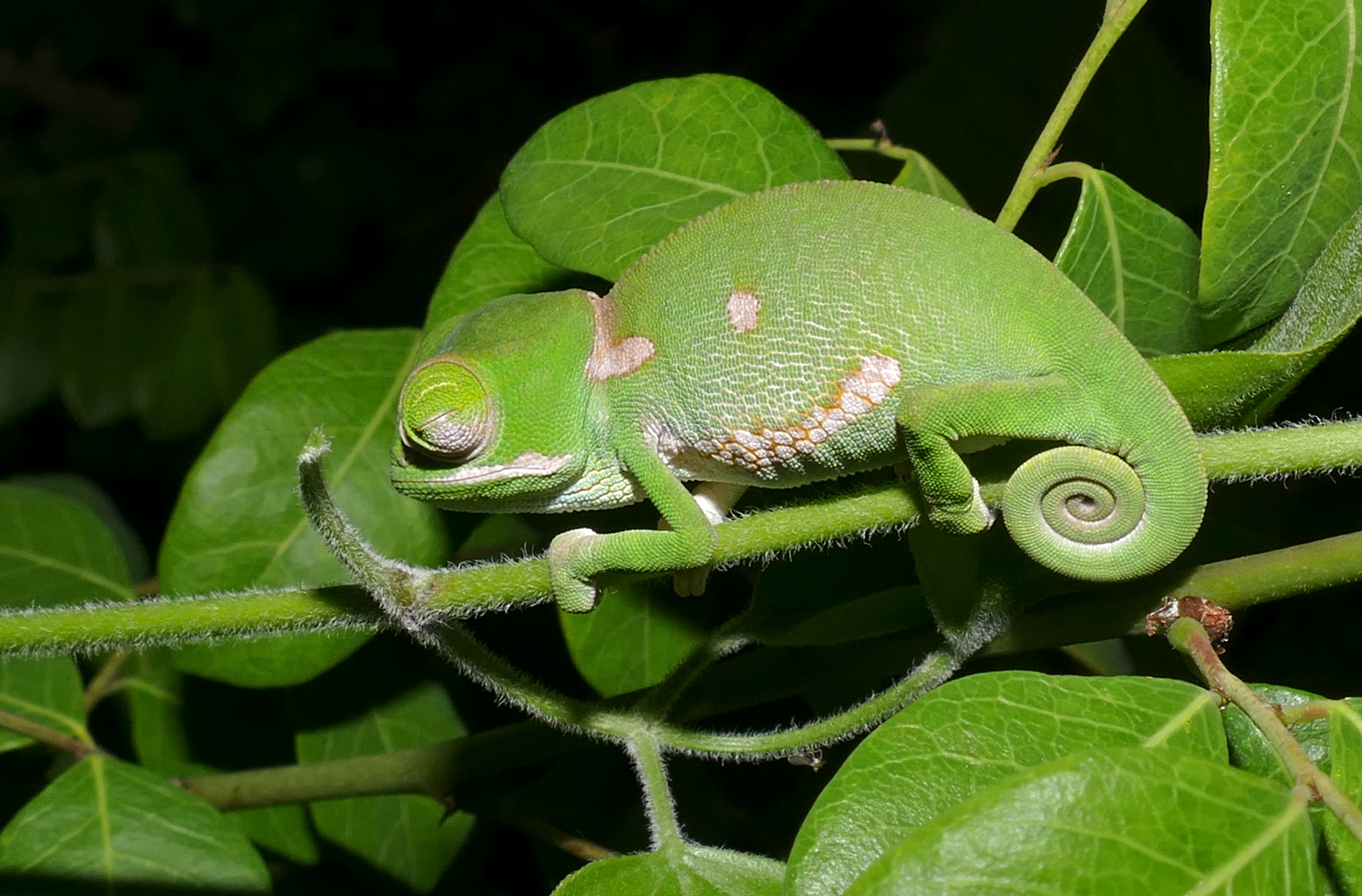 Lower Sabie Camp, Kruger NP, SOUTH AFRICA